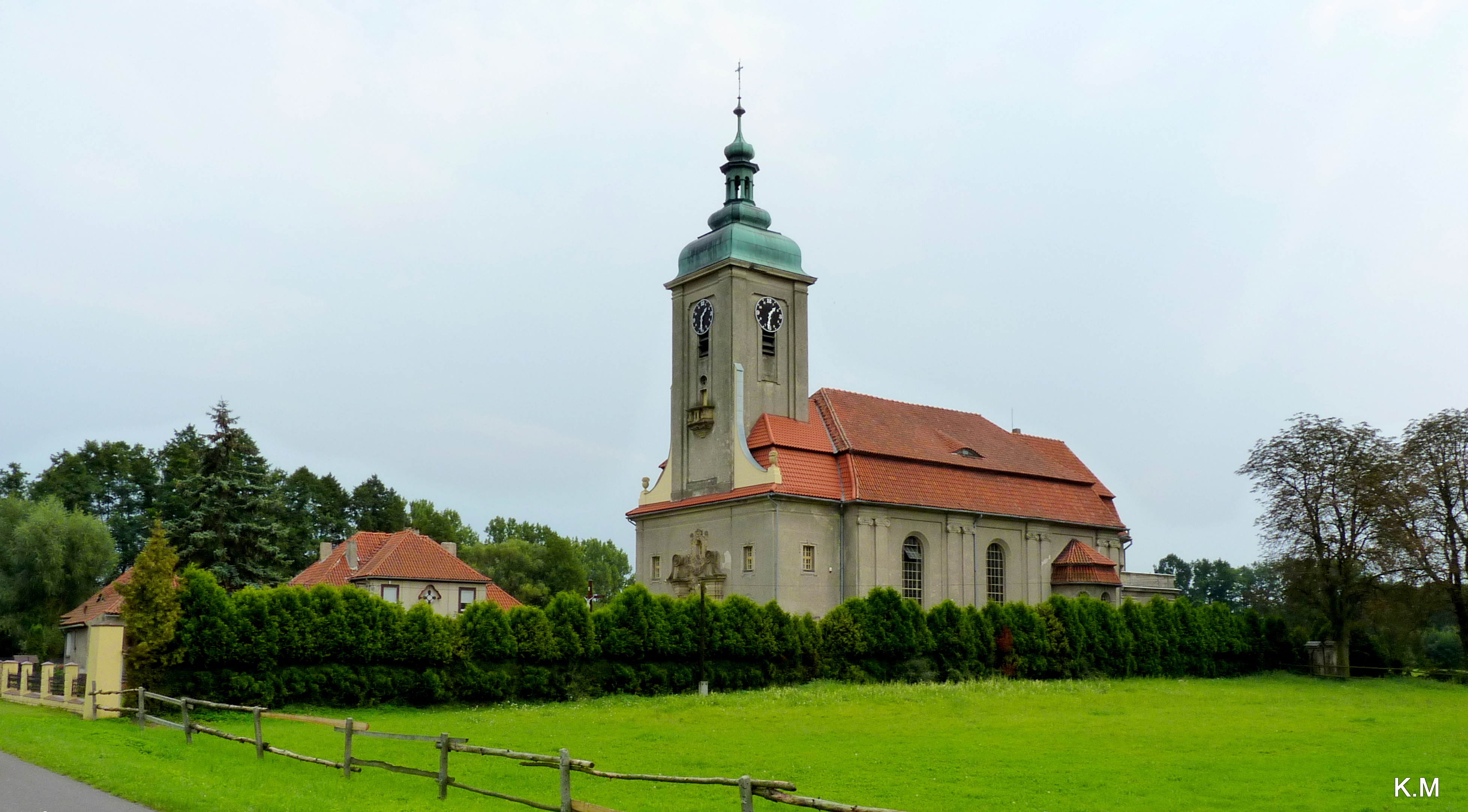 Neobarokowy kościół św. Augustyna (1911) w Kostowie, widok z drogi.